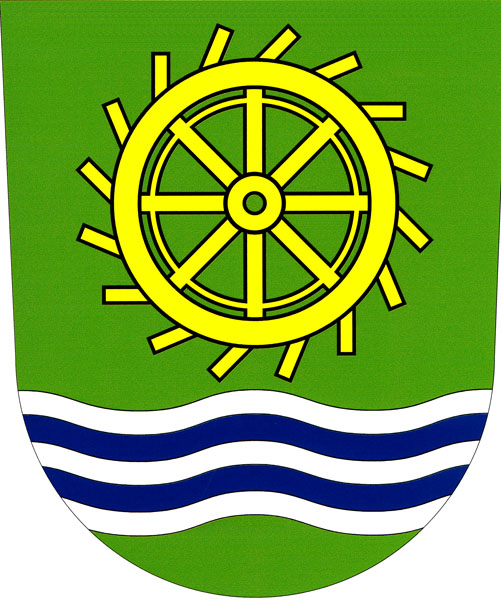 Znak obce Plavy